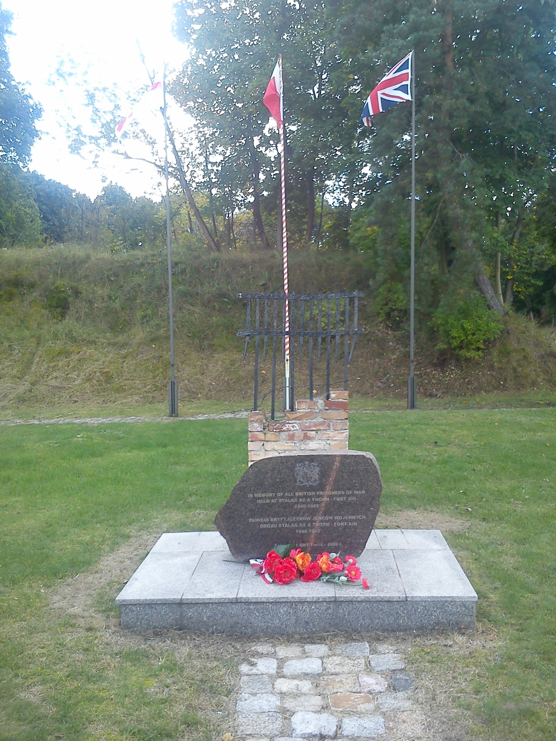 Toruń, fort XIII im. K. Kniaziewicza, 1880-1885, 1889-1893, 1905-1914